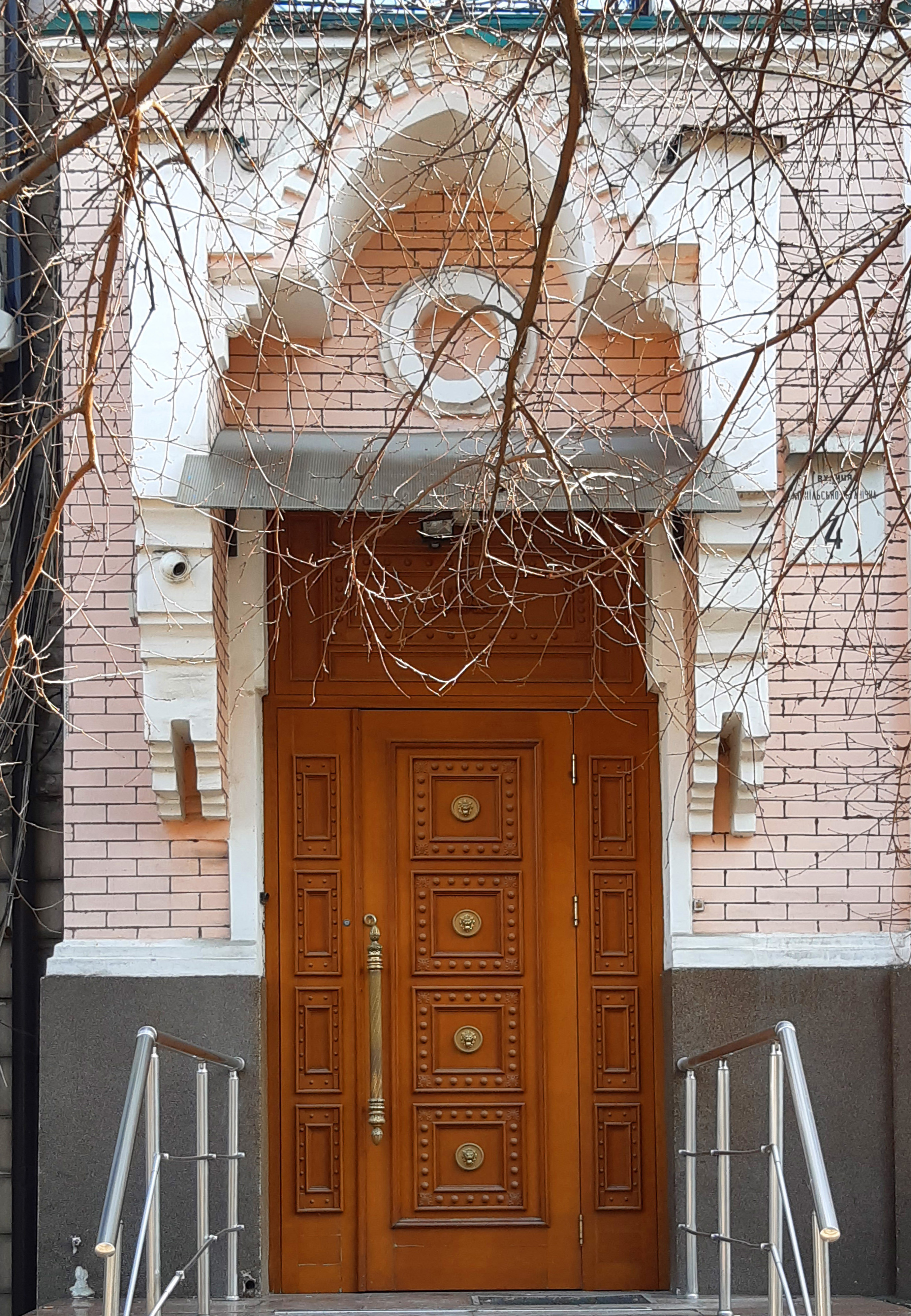 Вхід. Прибутковий будинок, Київ, вул. Микільсько-Ботанічна, 3